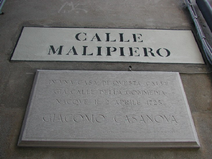 Targa commemorativa La foto è stata scattata nell'aprile 2004 a Venezia (Italia) e mostra la targa commemorativa, apposta dall'Azienda autonoma di soggiorno e turismo di Venezia, all'inizio della Calle Malipiero (già Calle della Commedia) luogo natale di Giacomo Casanova. Categoria:Immagini di Venezia